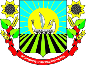 Герб_Великоновоселківського_району